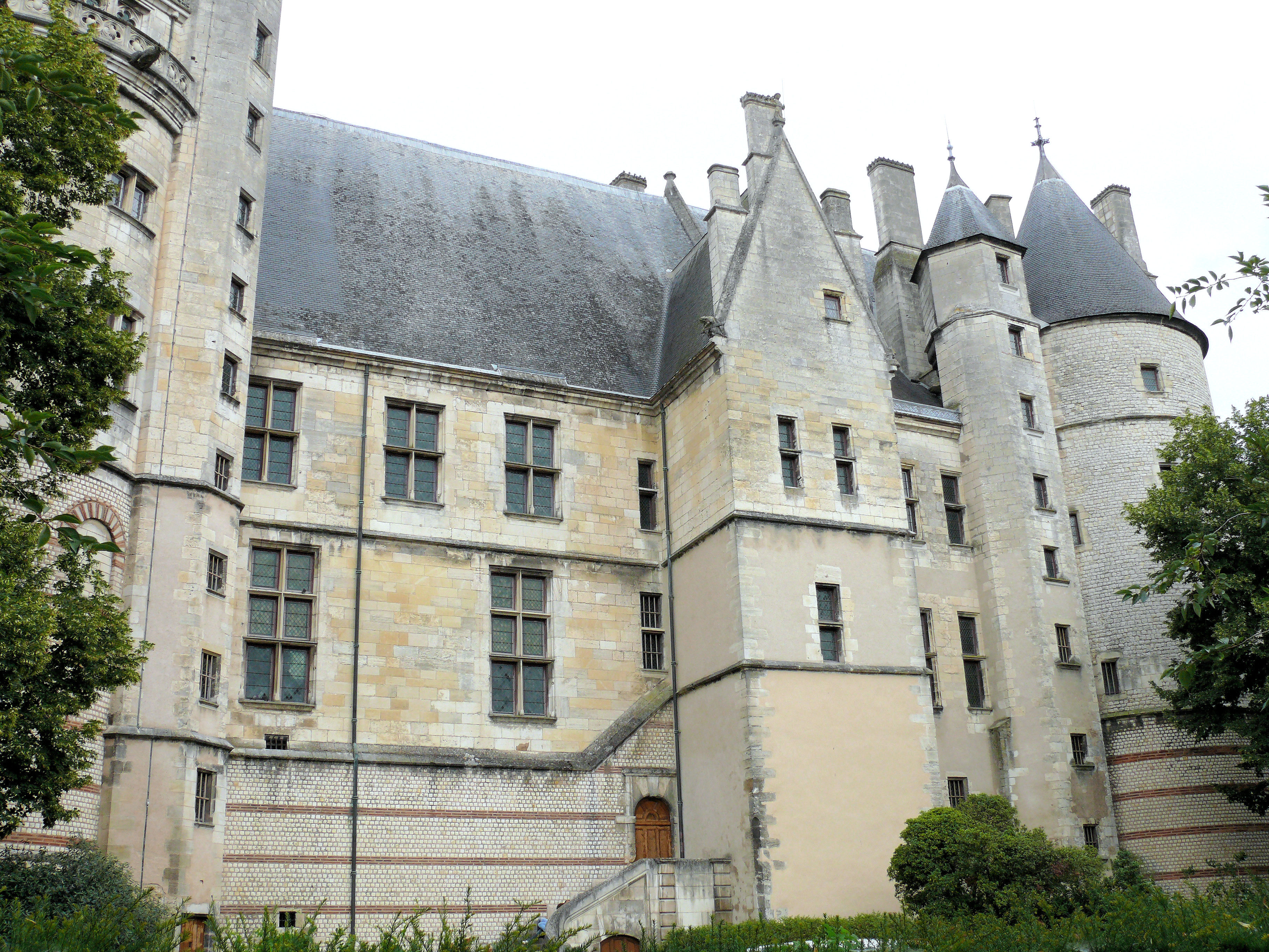 Bourges - Palais Jacques-Cœur - La façade du palais construite sur les anciens remparts gallo-romains de la première enceinte de la ville